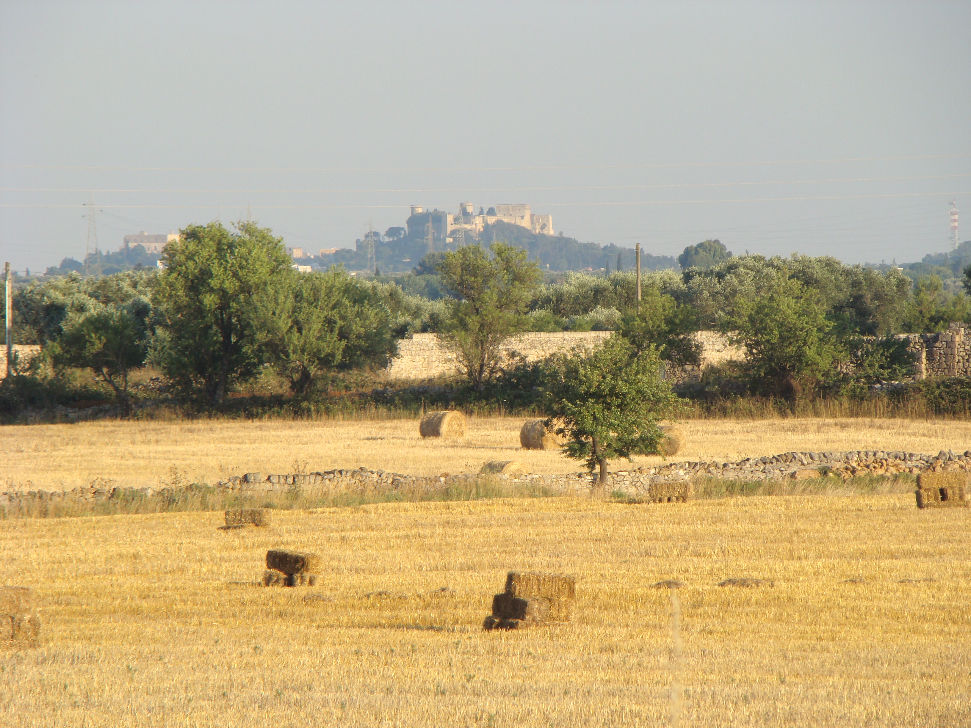 Panorama di Oria da Nord